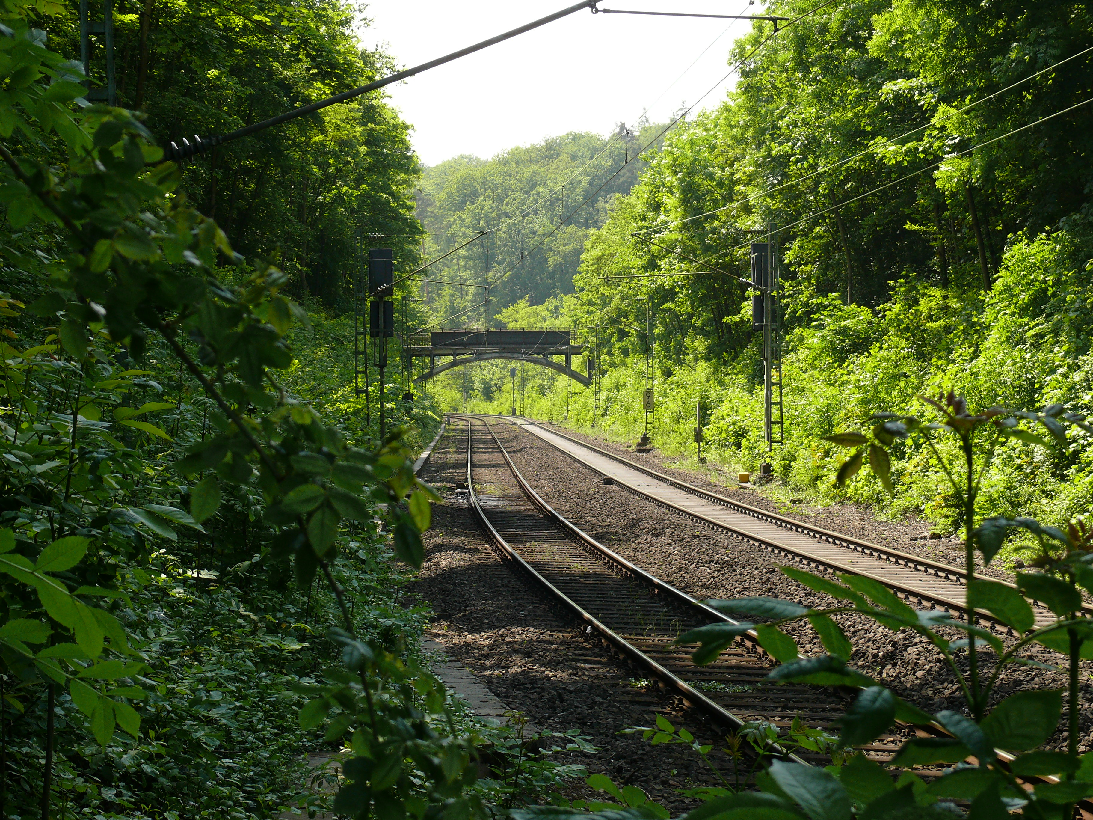 Die heutige Situation entlang der Strecke, in dem Bereich sich einst der Haltepunkt befand.